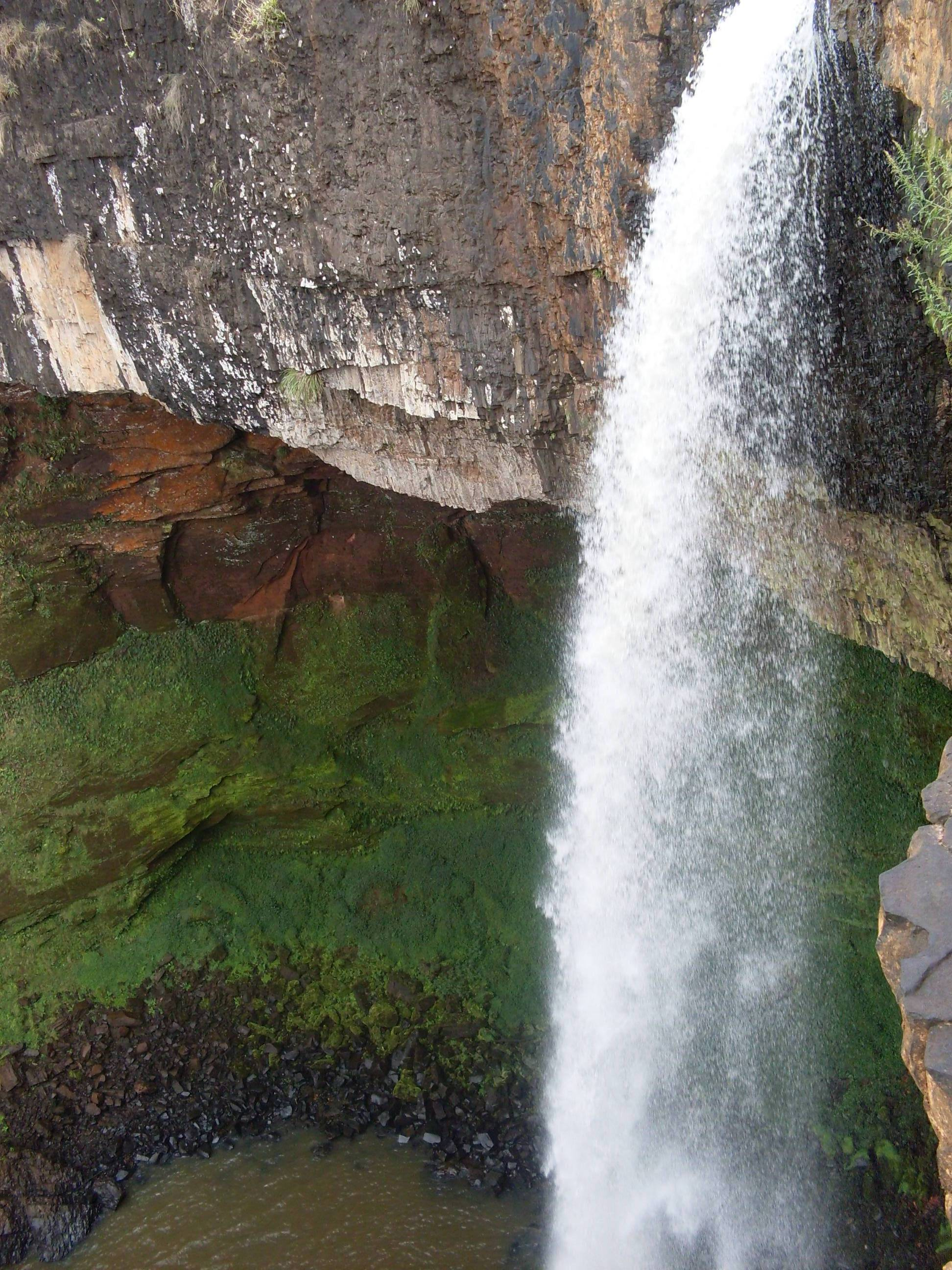 Cachoeira do Esmeril. Altinopolis SP